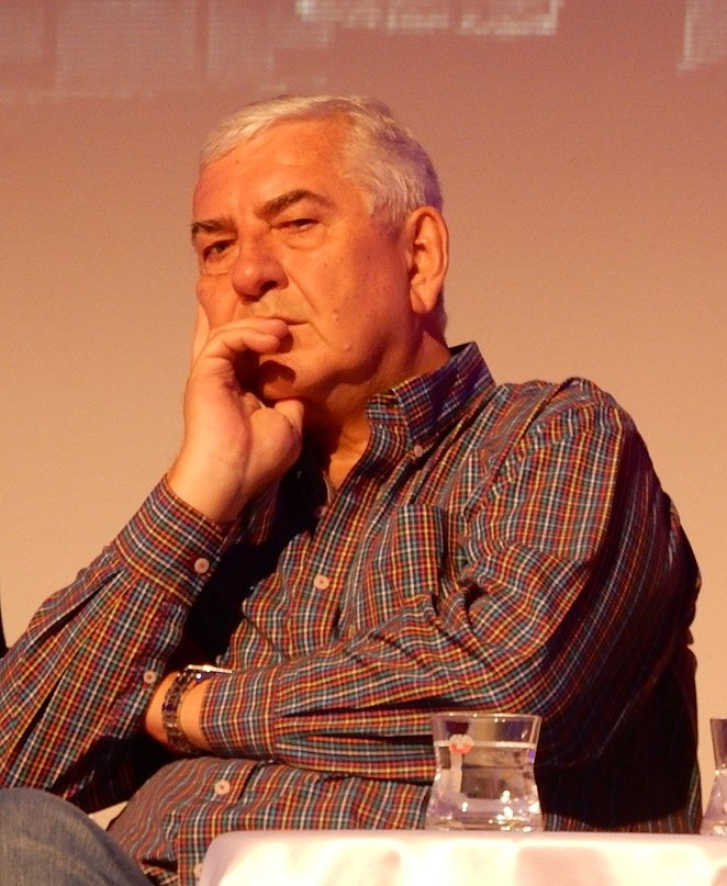 Fotky z novinářské konference 2.8.2016. Autor: Blanka Borová (Karolína Černá) pro Kritiky.cz